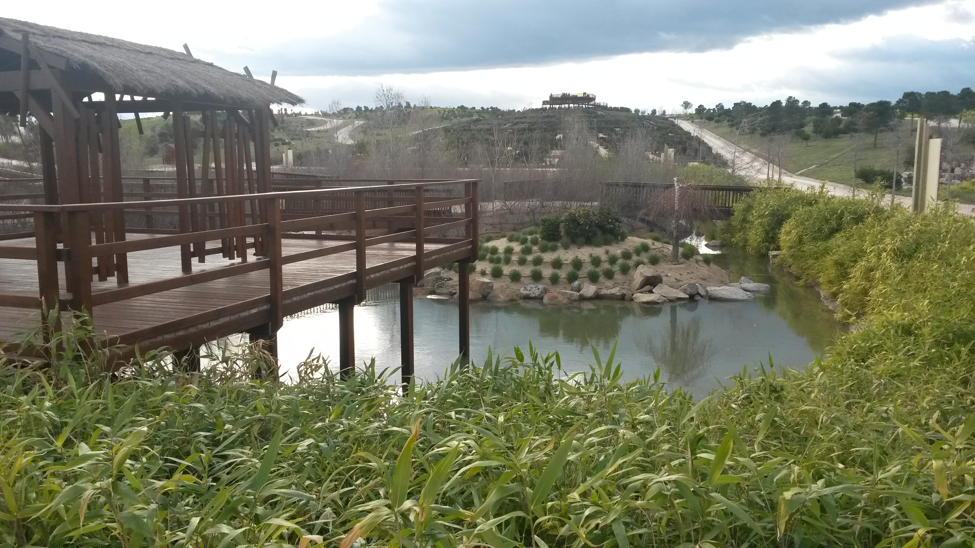 Foto desde el Arboreto al mirador del laberinto.